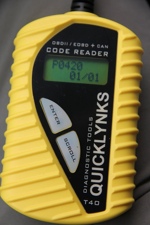 ODB-II lukijan näyttämä esimerkki viasta. ODB= On-Board Diagnostics. Koodi P0420=Catalyst System Efficiency Below Threshold (Bank 1). Eli katalysaattorin teho on alle raja-arvon (esim. katalysaattori lopussa tai joku muu vika). Huom: Muista säilyttää viittaus kuvaajaan, mikäli käytät kuvaa.